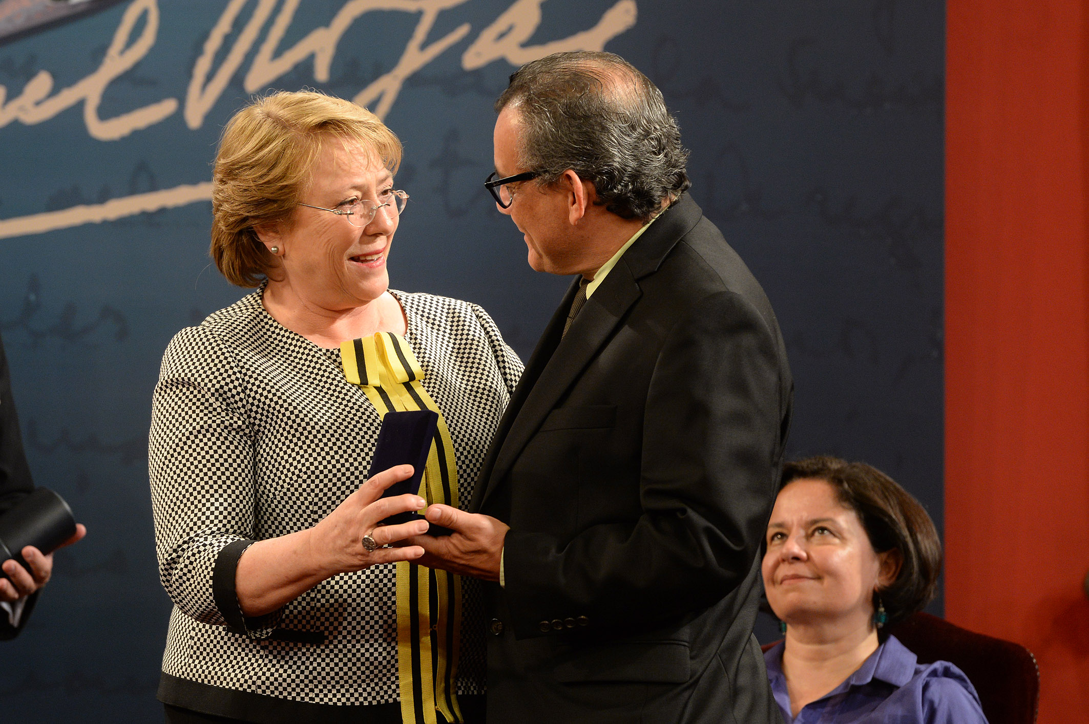 Entrega del Premio Iberoamericano Manuel Rojas, por parte de la presidenta de Chile, Michelle Bachelet, al escritor salvadoreño Horacio Castellanos